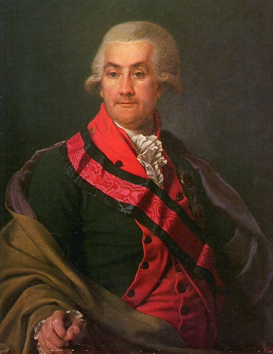 генерал от инфантерии, генерал-адъютант